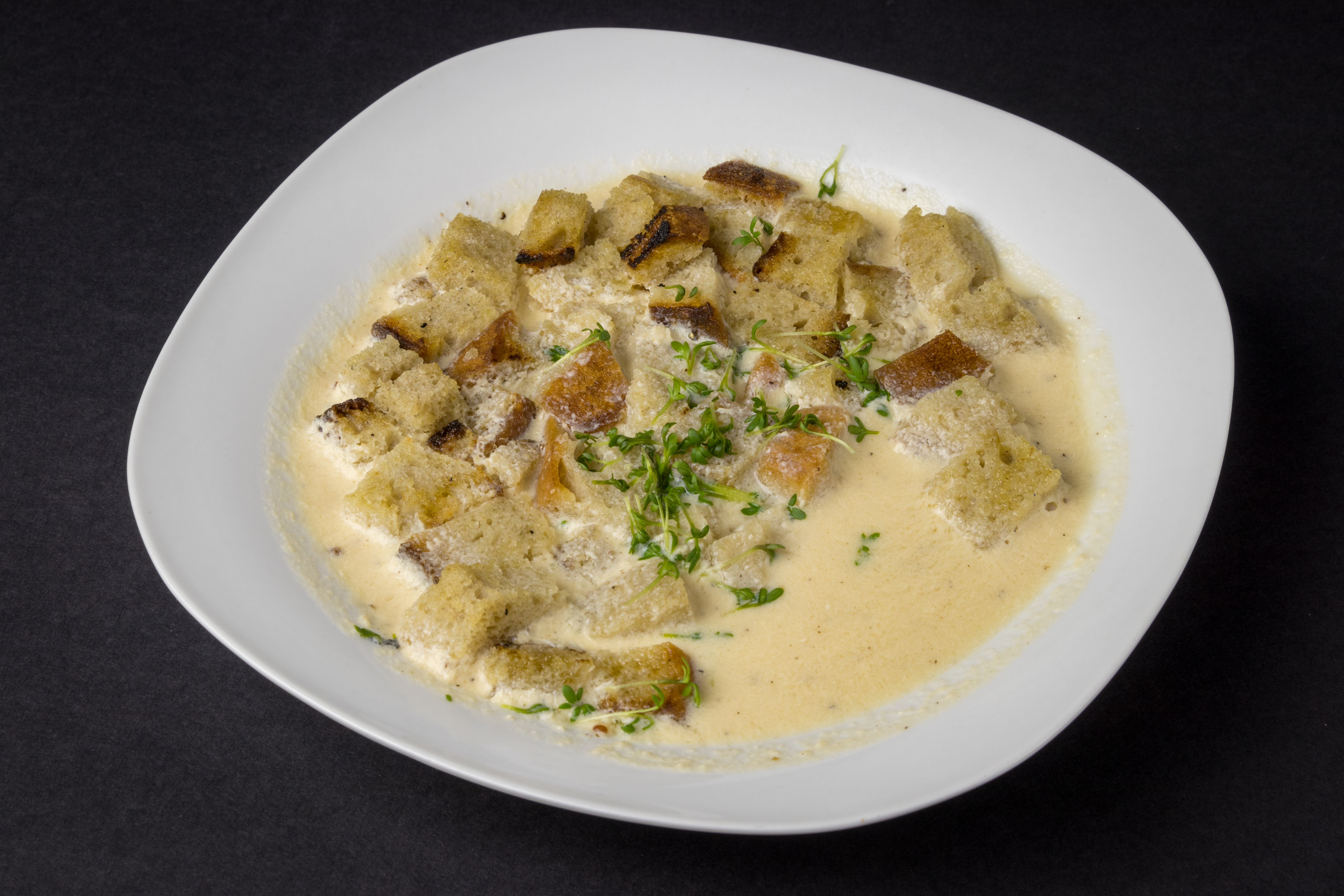 Biersuppe auf Basis von Kölsch auf gerösteten Brotstückchen